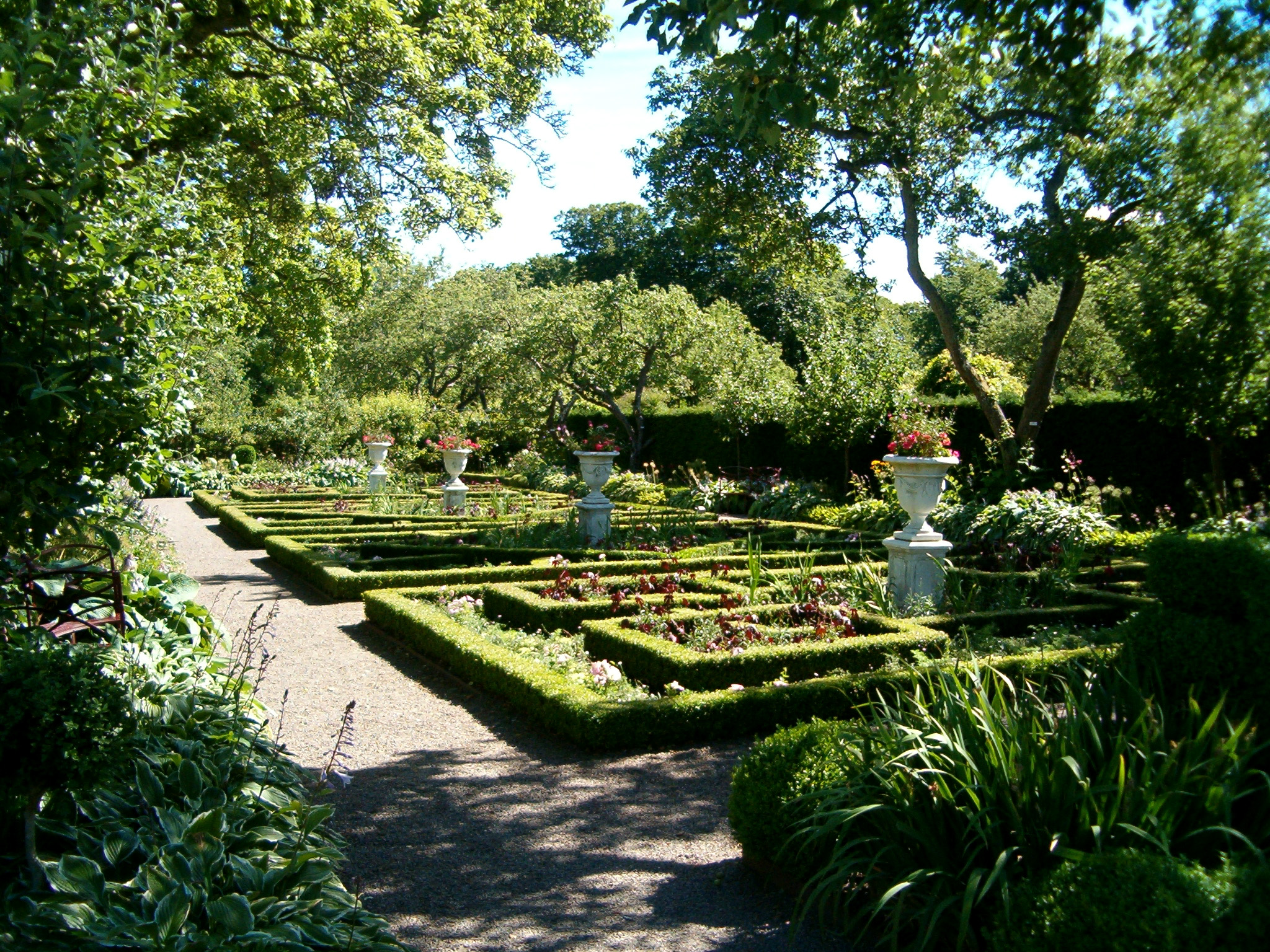 Trädgård med buxbomsparterrer i Sofiero slottsträdgård.